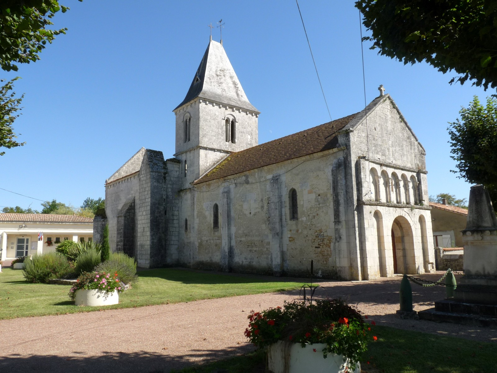 Eglise de St-Hilaire-du-Bois, Charente-Maritime, France